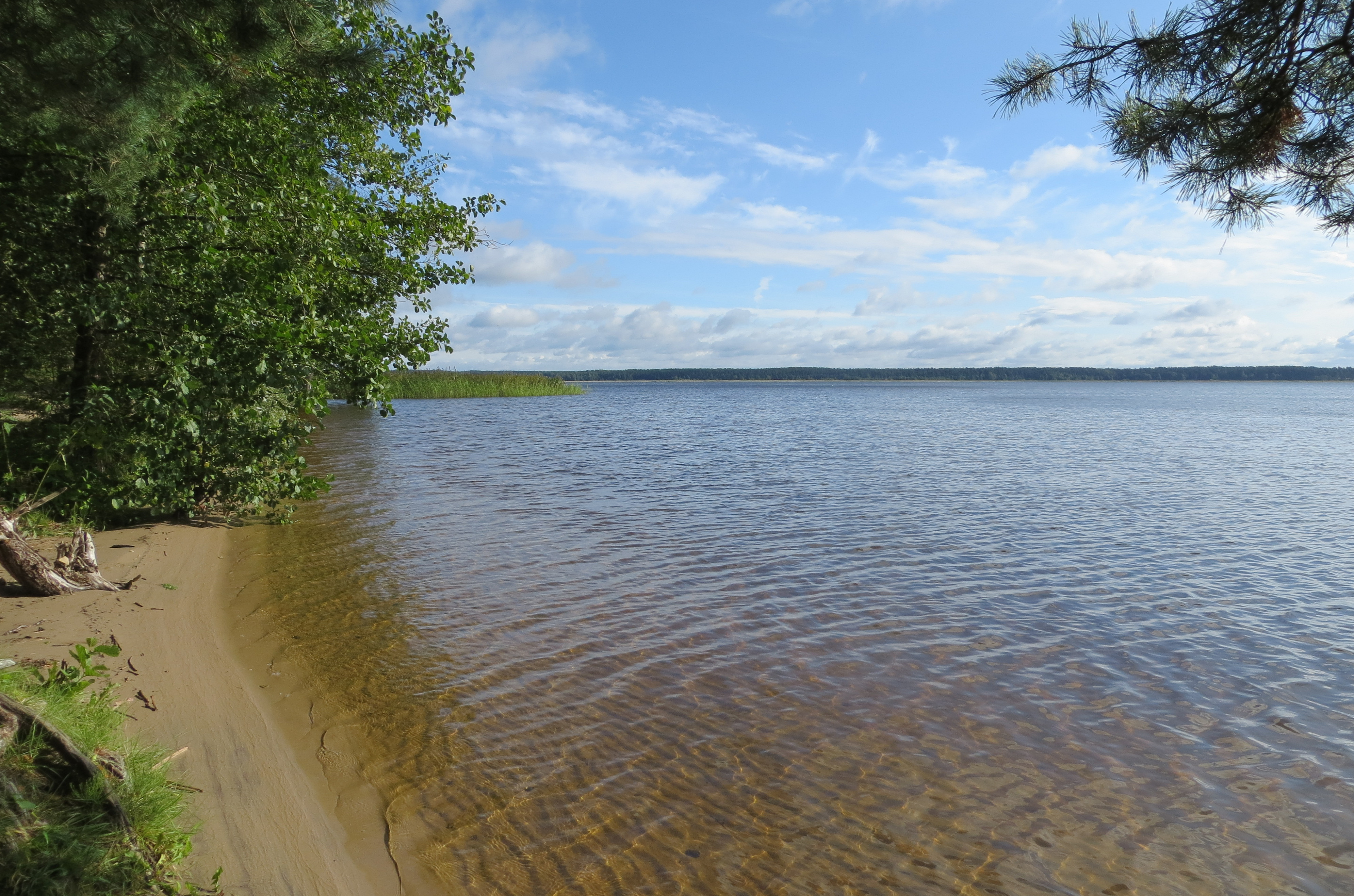 Вид на озеро Кишэзерс из Межапарка